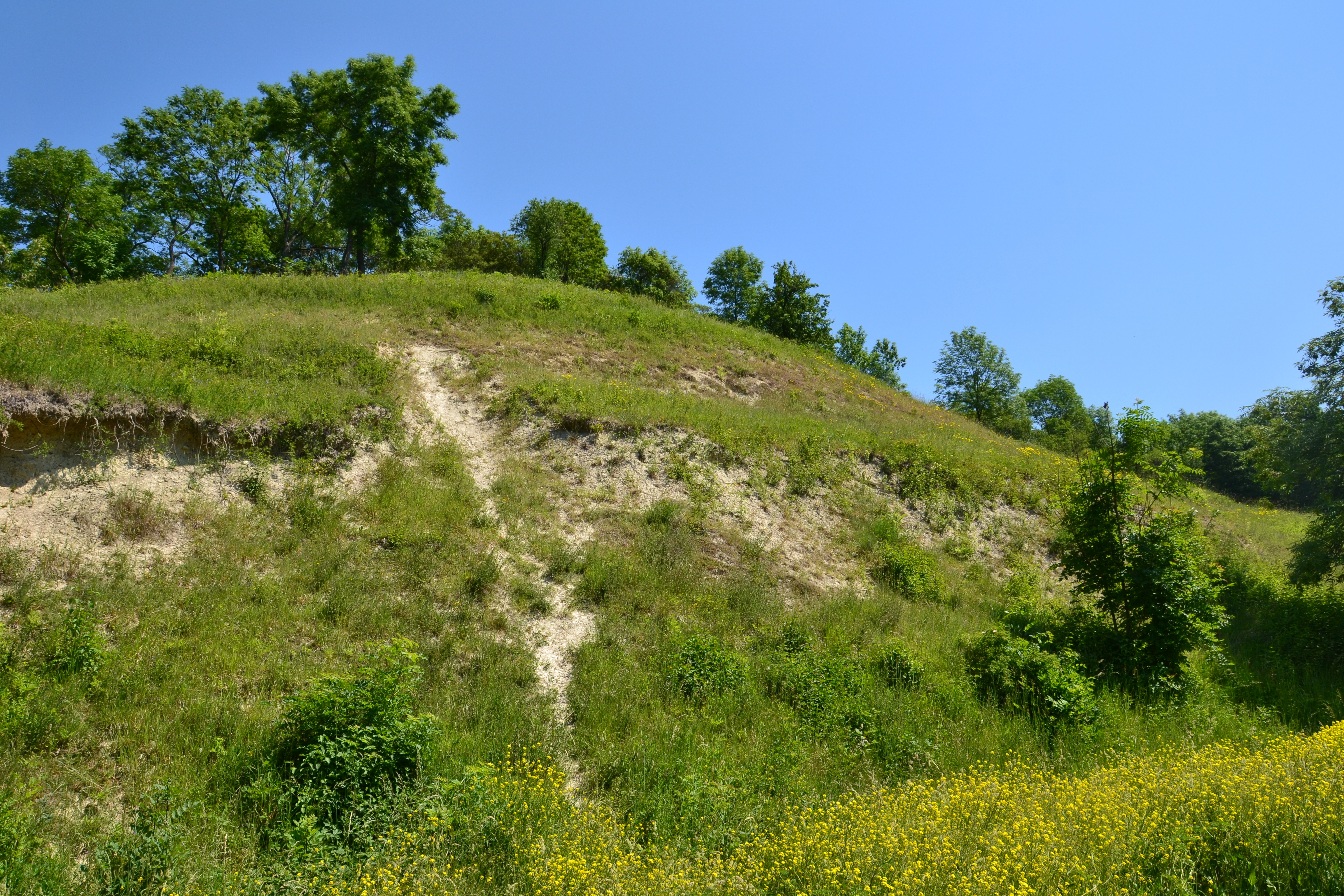 Jižní část PR Trupelník